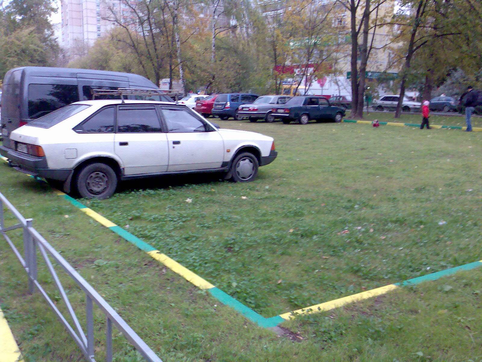 Экопарковка на газонной решетке.